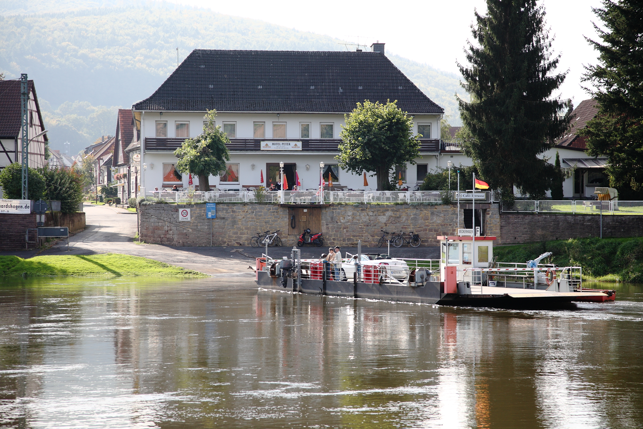 Veckerhagen - die Gierseilfähre (Rollfähre zwischen Veckerhagen und Hemeln an der Weser).